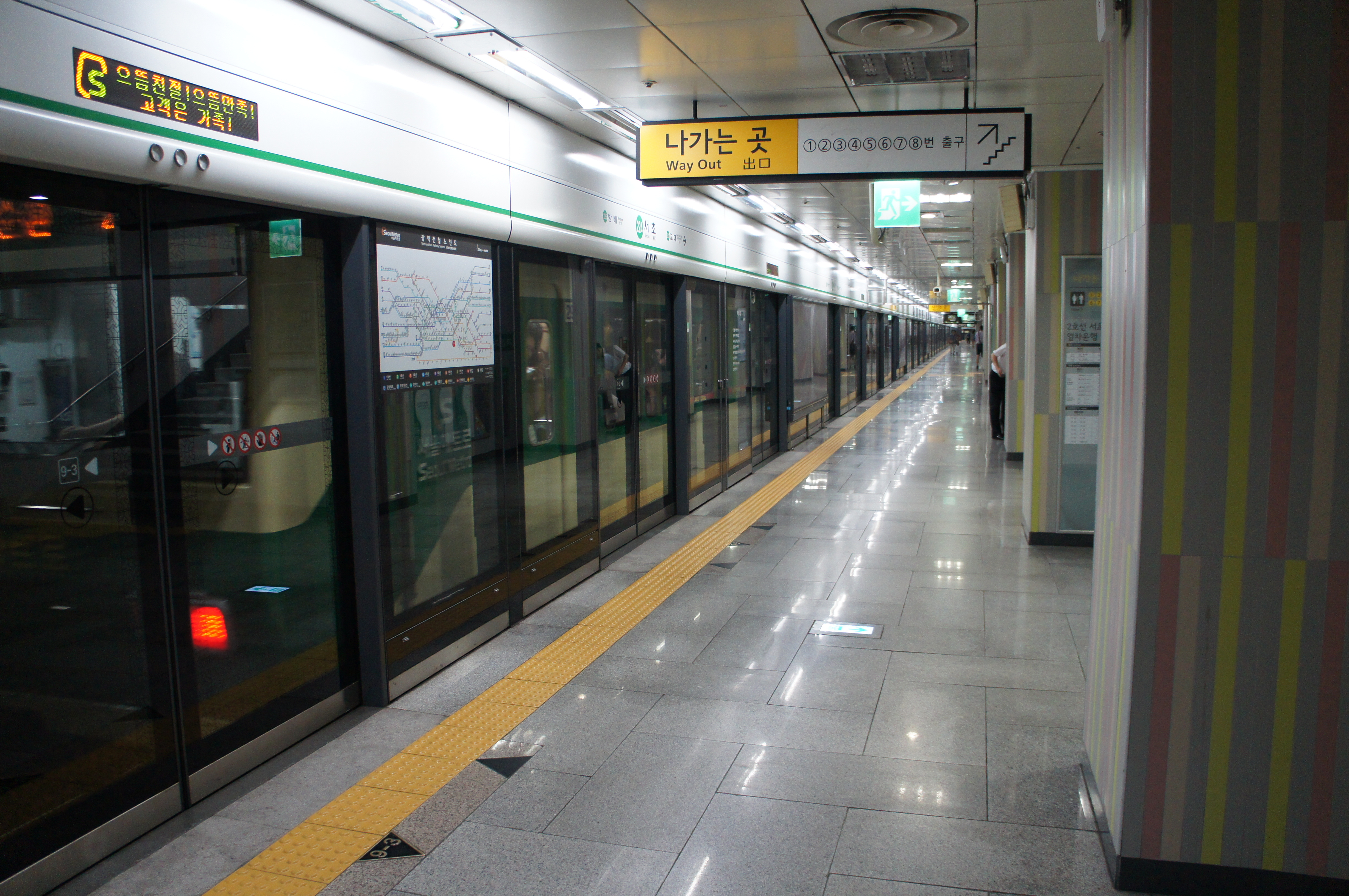 서초역 승강장